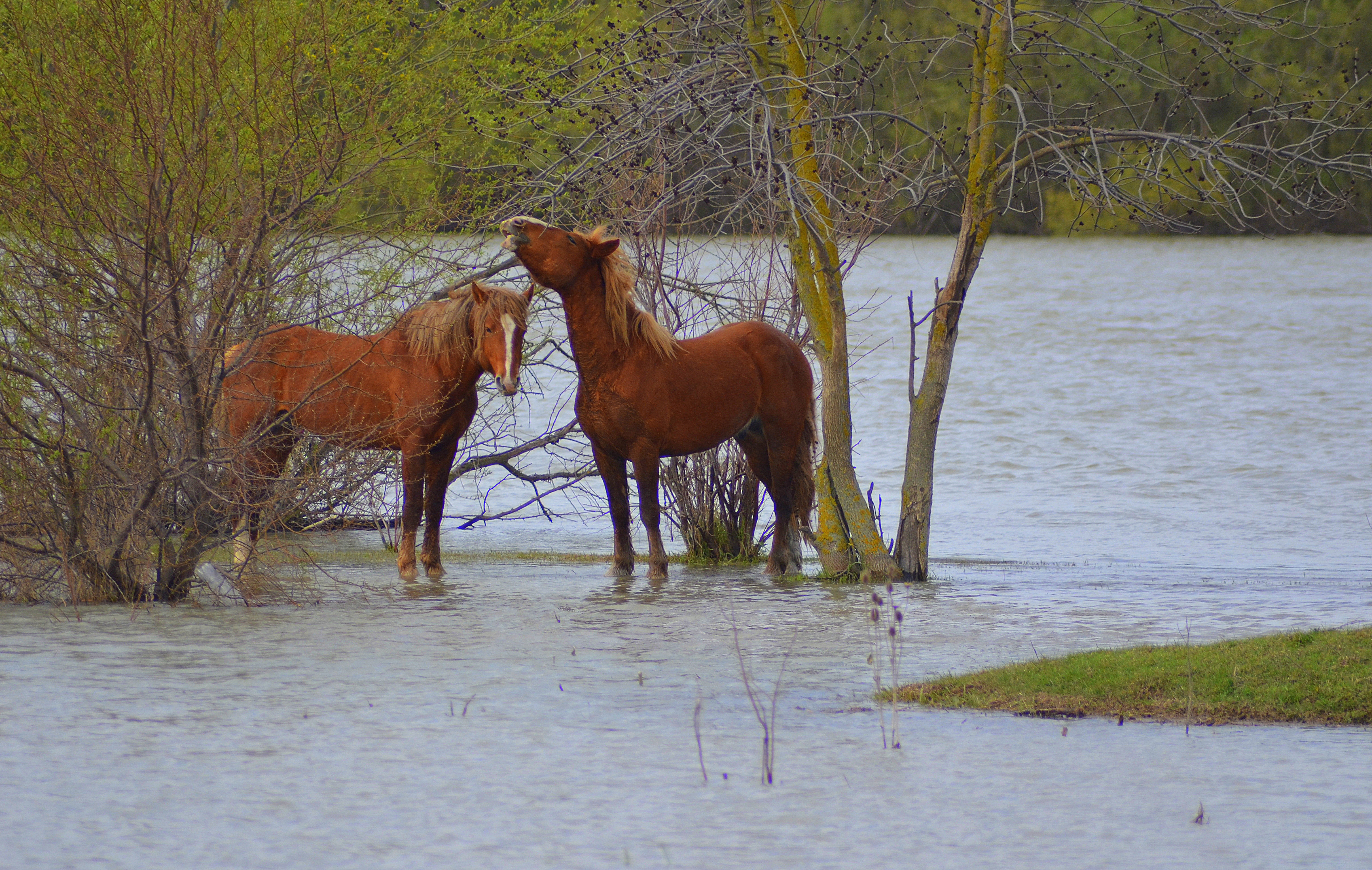 Дунайський біосферний заповідник, Кілійський р-н, м. Вилкове, вул. Татарбунарського повстання, 132 а